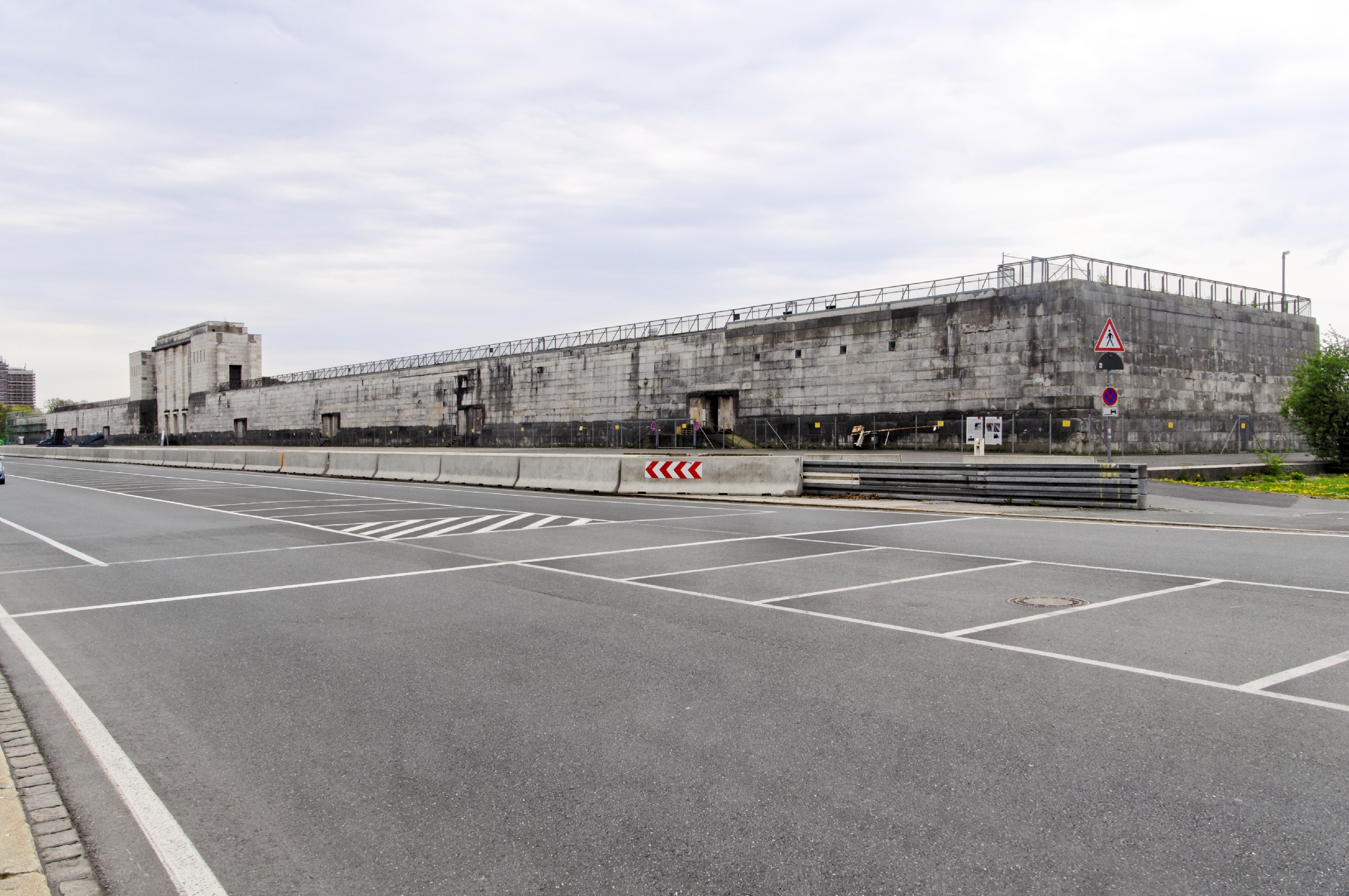 Stuttgart-Offenes Editieren-Mai 2015